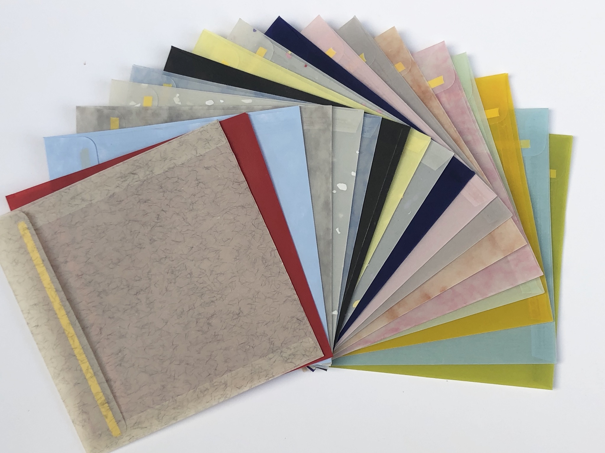 Phong bì hình vuông làm từ giấy can mỹ thuật